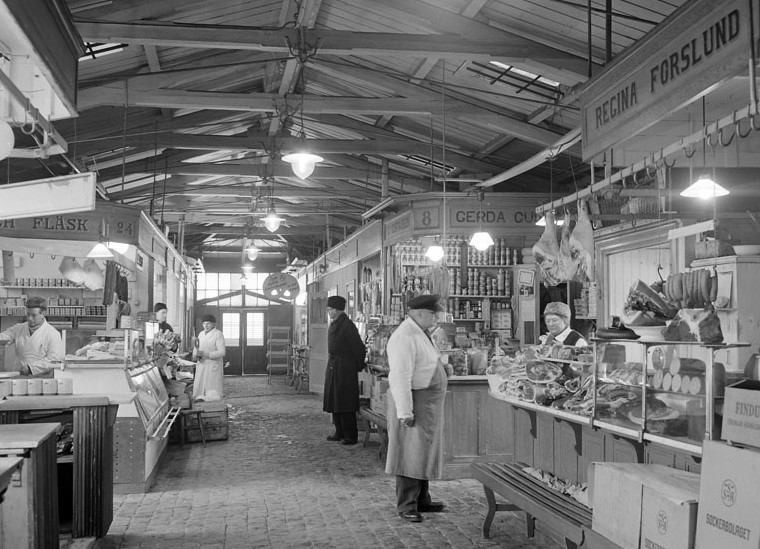 Kötthallen vid Mälartorget (tidigare kvarteret Icarus)